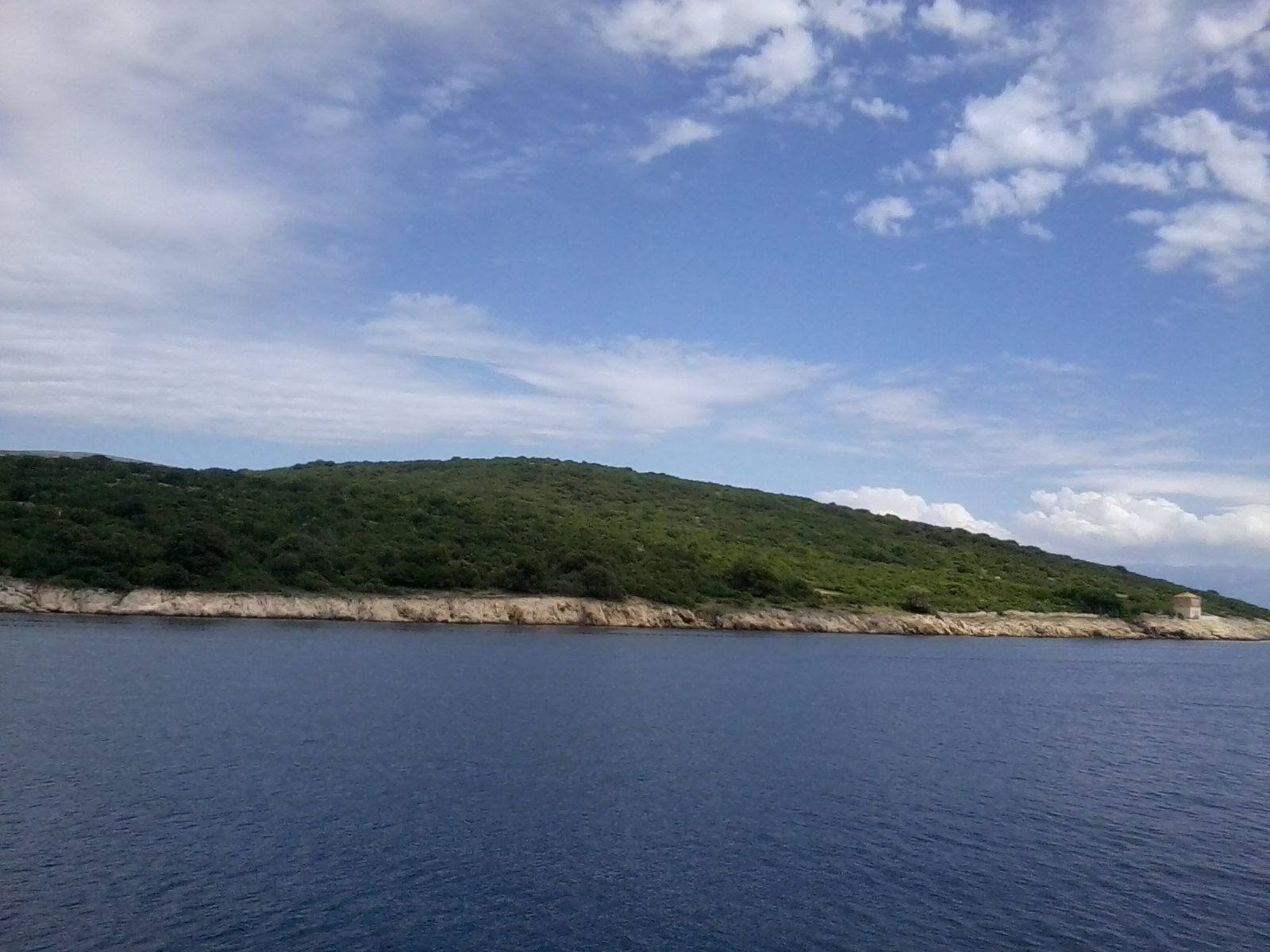 Punta (rt) Negrit na jugozapadu otoka Krka, nedaleko mjesta Punat; Hrvatska. Na desnoj strani se vidi i lanterna (svjetionik) Tranjevo.